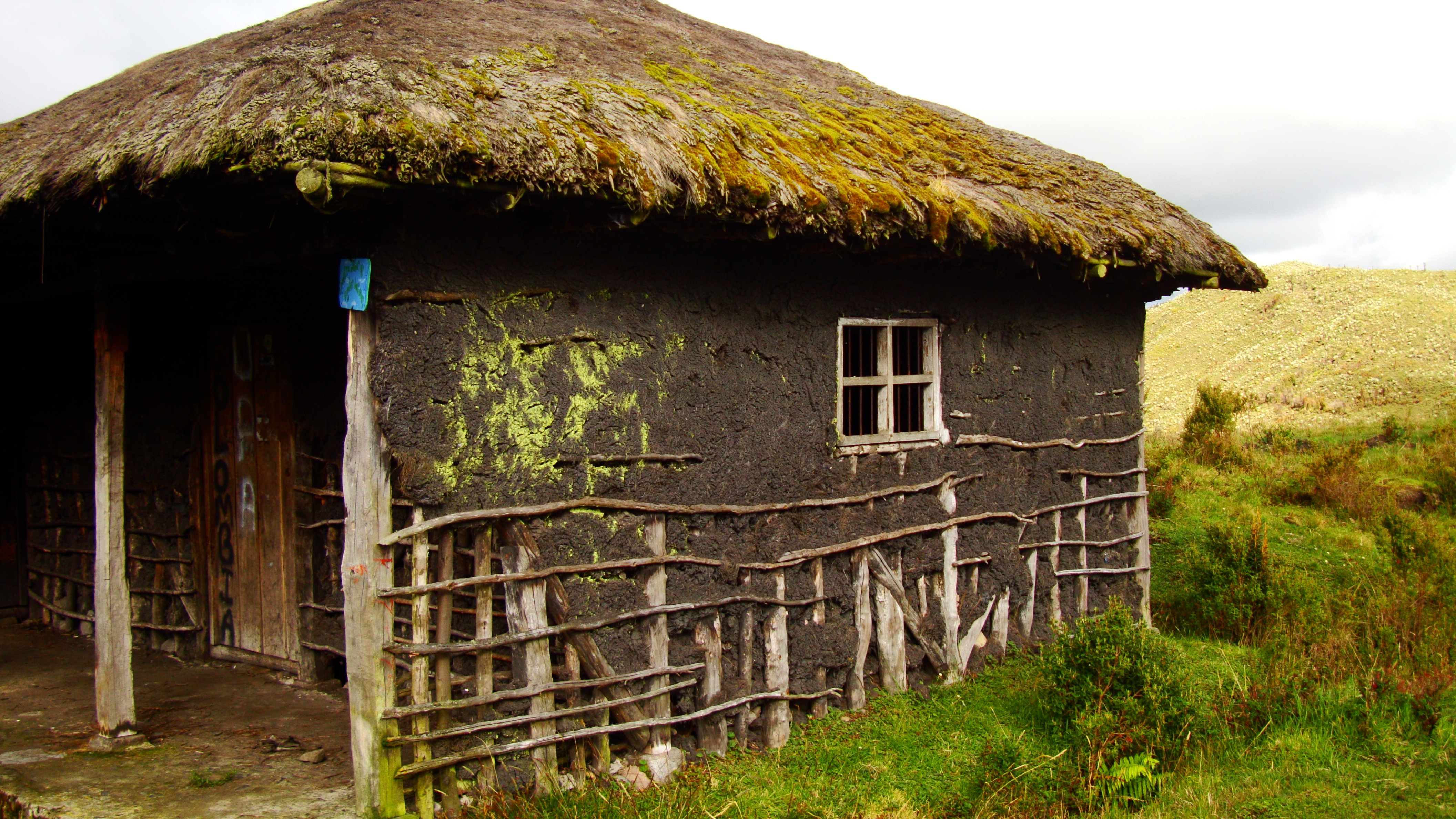 Casa indígena del grupo étnico Los Pastos ubicada en el páramo de Chiles en el corregimiento de Chiles del municipio El Cumbal. En este corregimiento vive una comunidad en las laderas del volcán Chiles. Departamento de Nariño. Esta fotografía fue tomada en el municipio colombiano con código 52227.